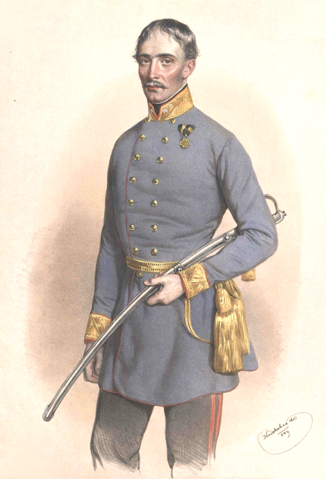 Heinrich von Hentzi, Lithographie von Joseph Kriehuber, 1849